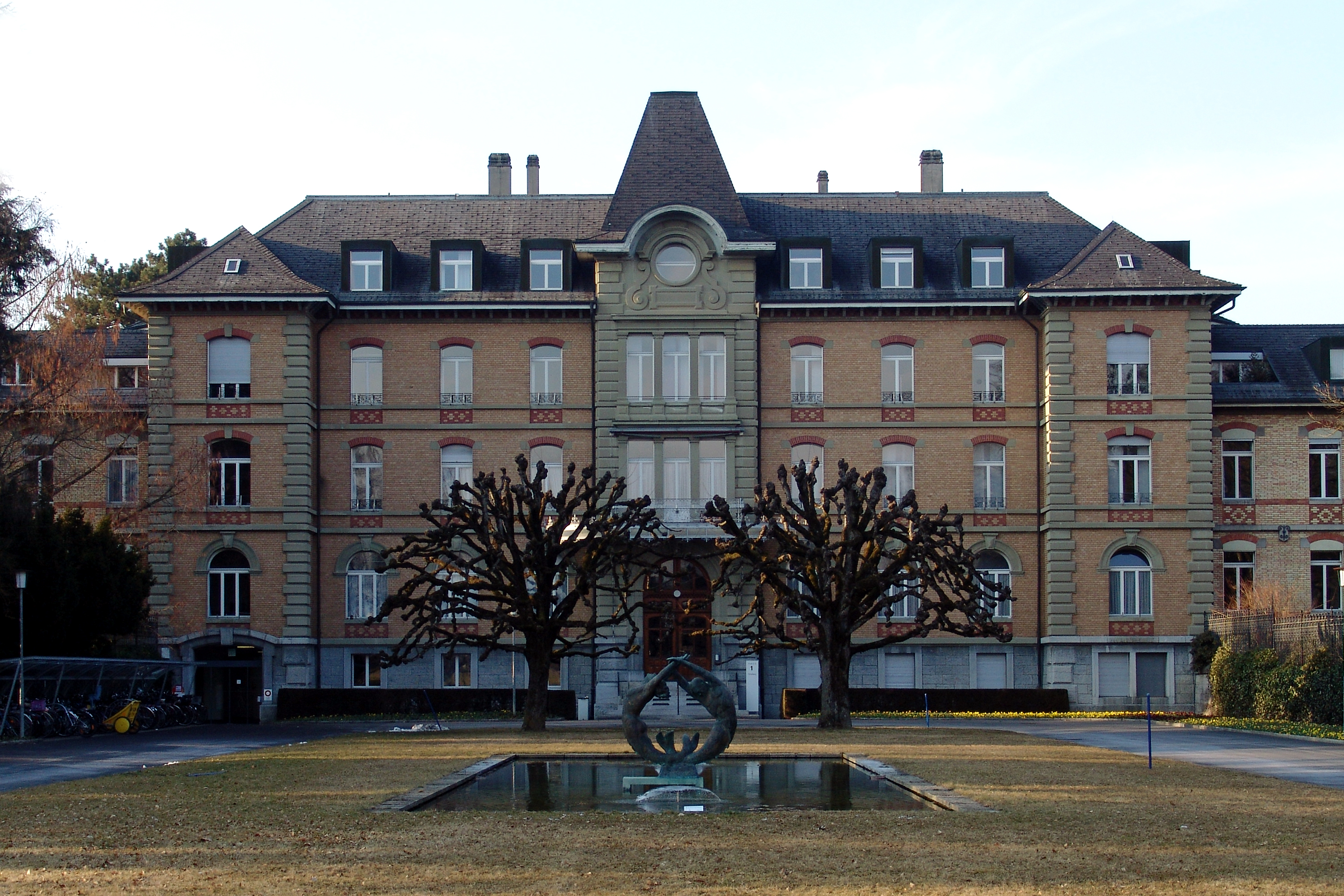 Eingangsfront Psychiatrisches Zentrum Münsingen Schweiz